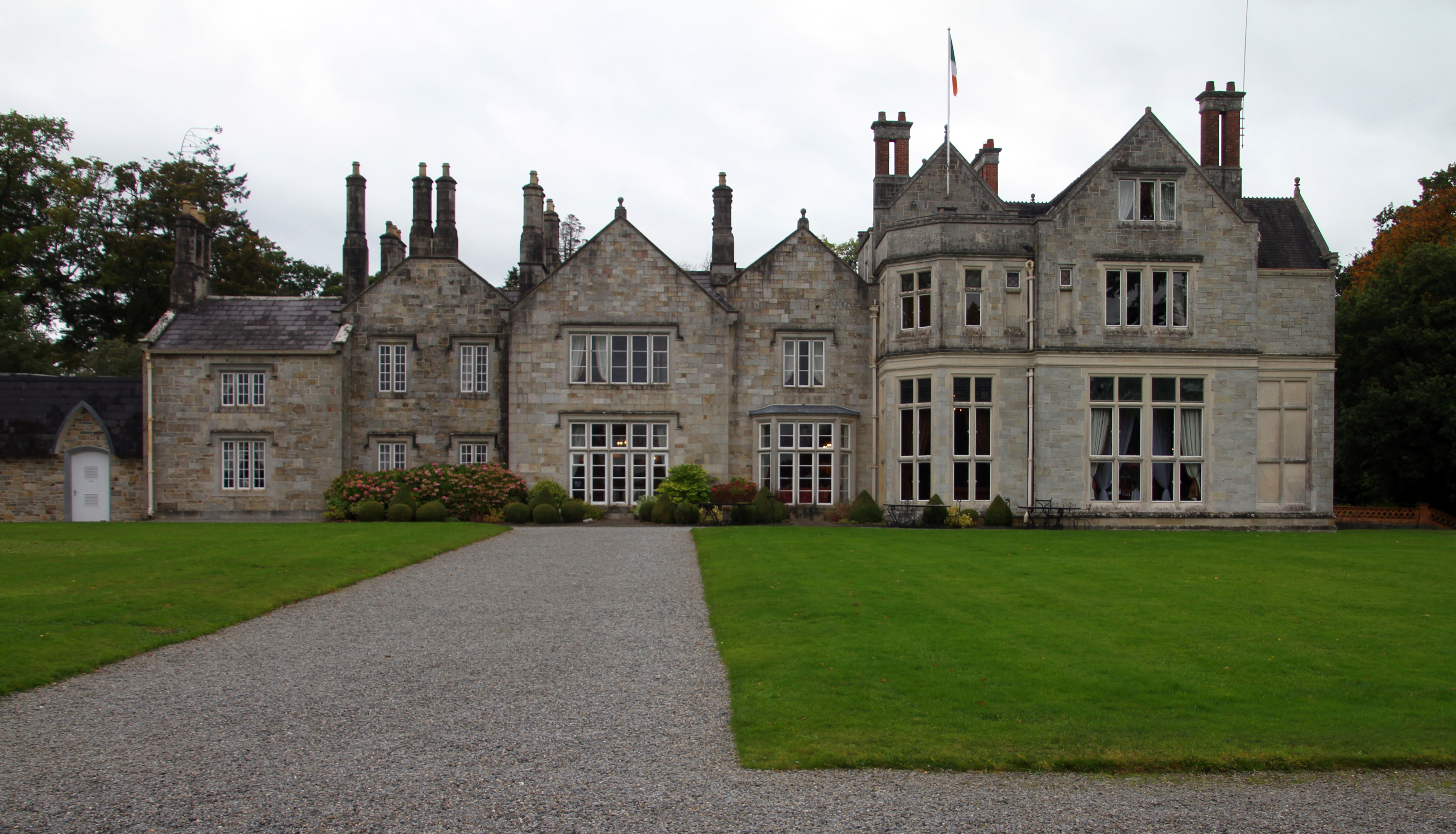 Mohill, Lough Rynn Castle